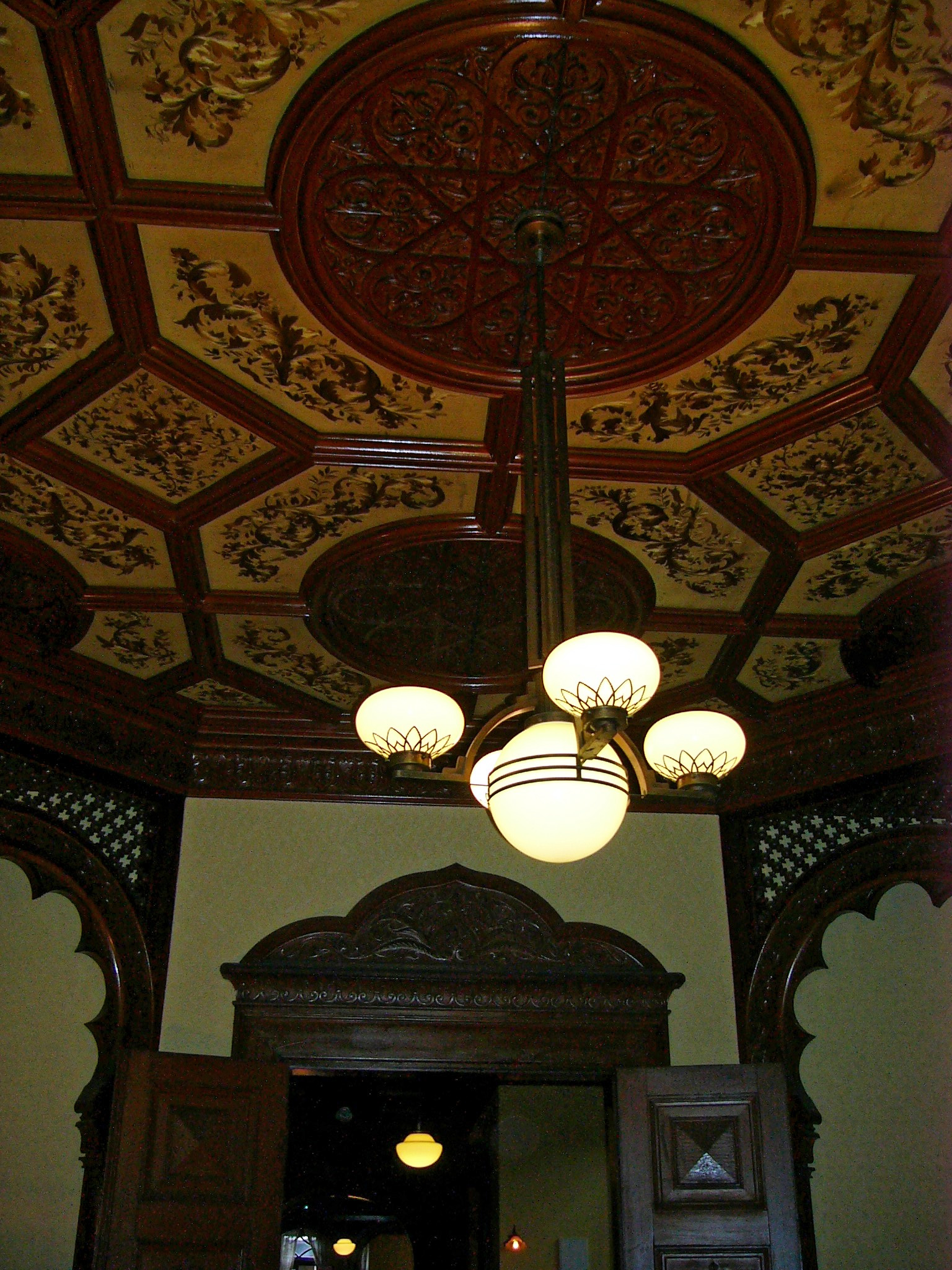 Old Iwasaki House in Taito-ku, Tokyo, Japan